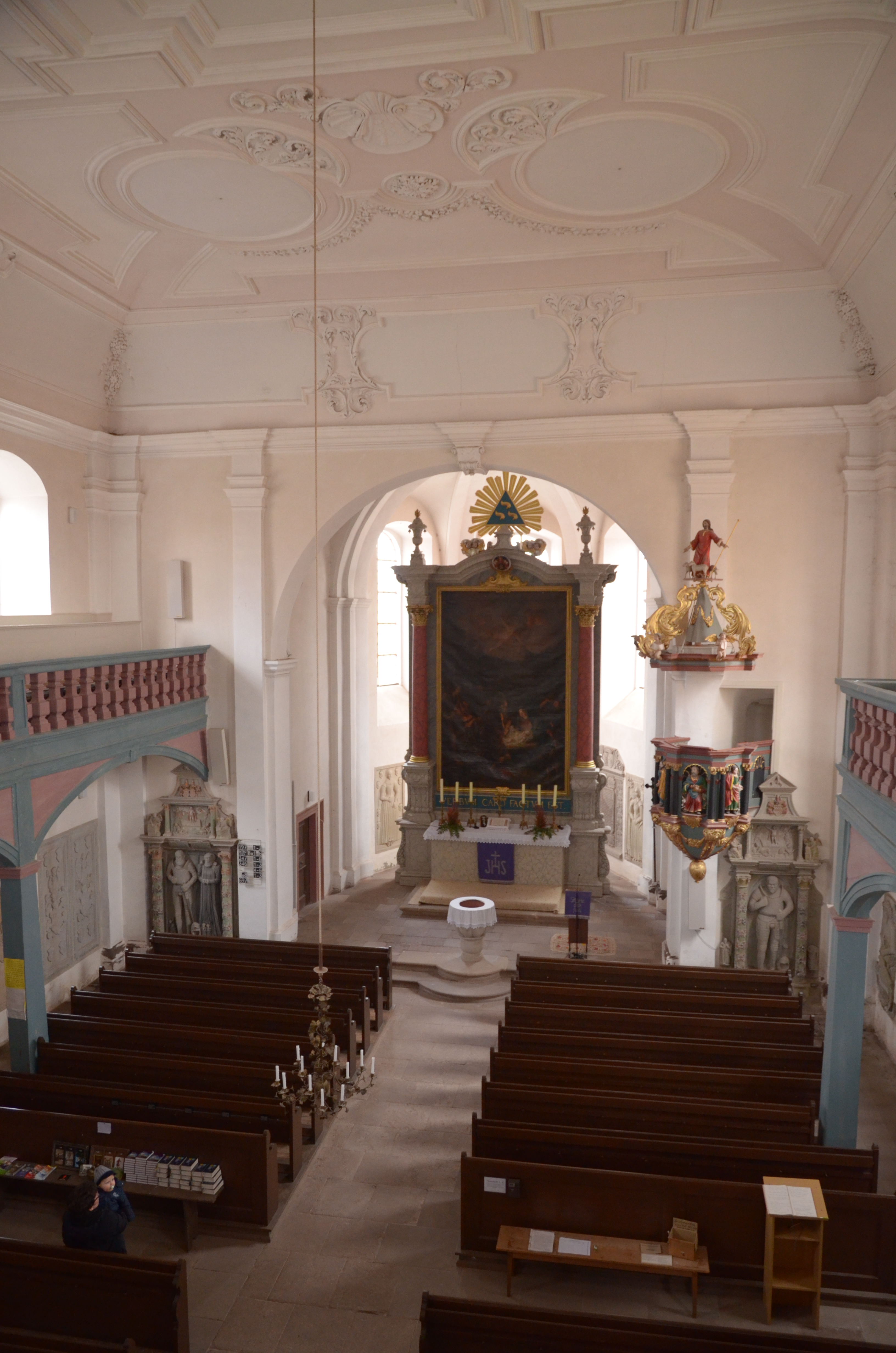 evang.-luth. Martinskirche in Wetzhausen